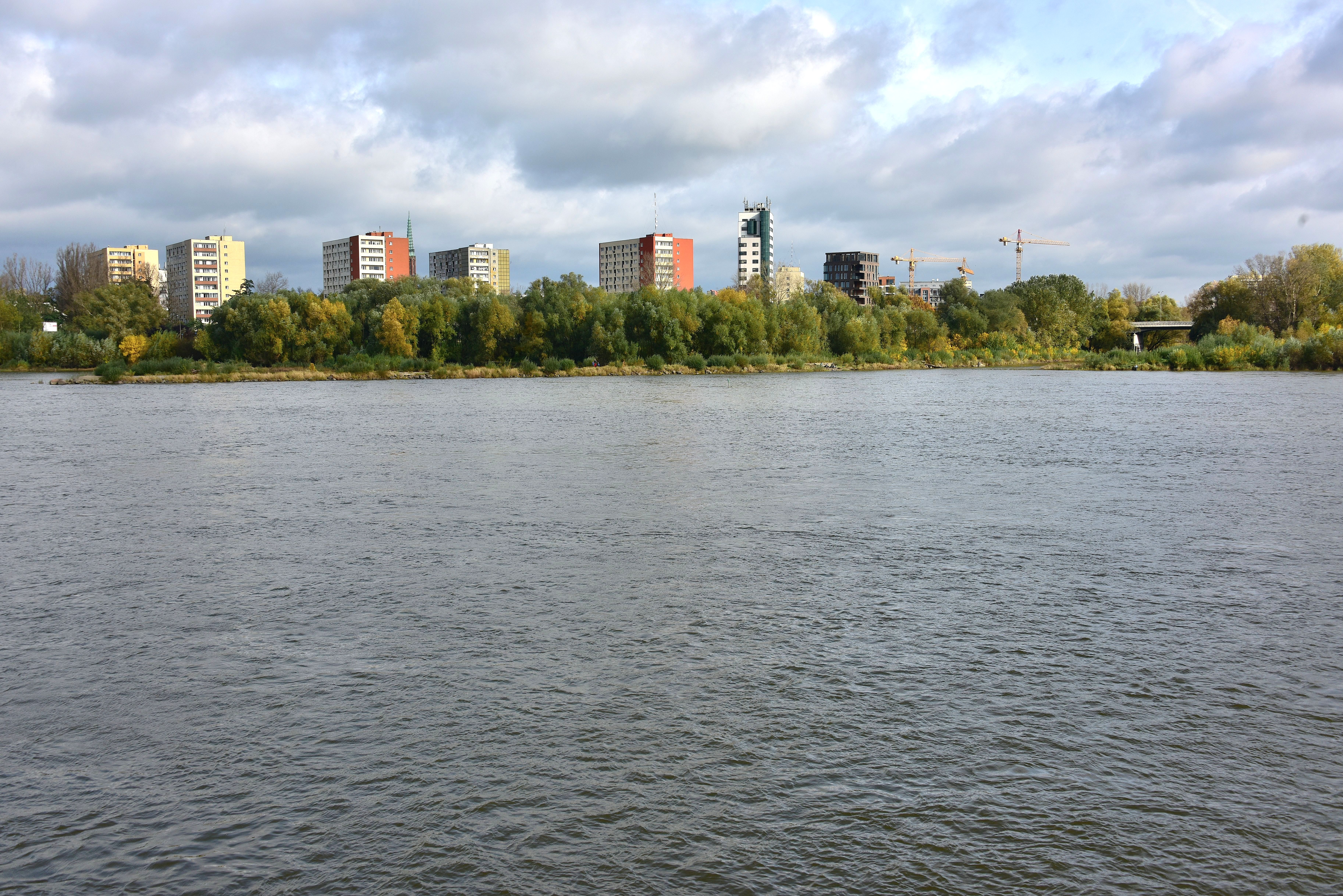 Wisła w Warszawie na wysokości ul. Karowej, widok na stronę praską